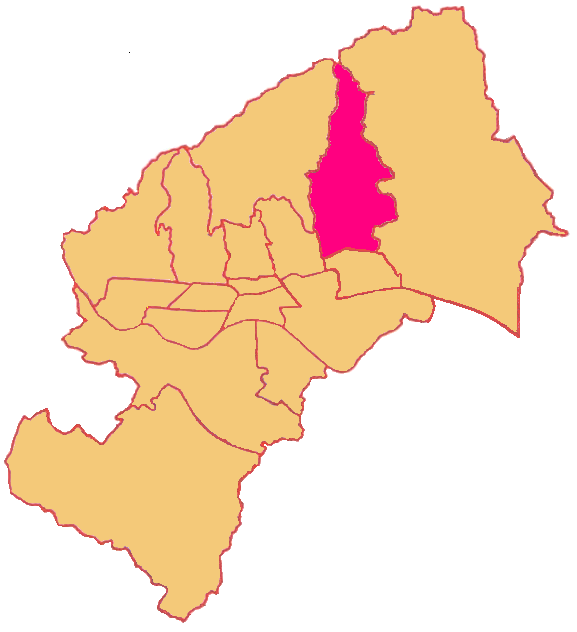 Map of Gornja Dubrava District in Zagreb (Gradska četvrt Gornja Dubrava)